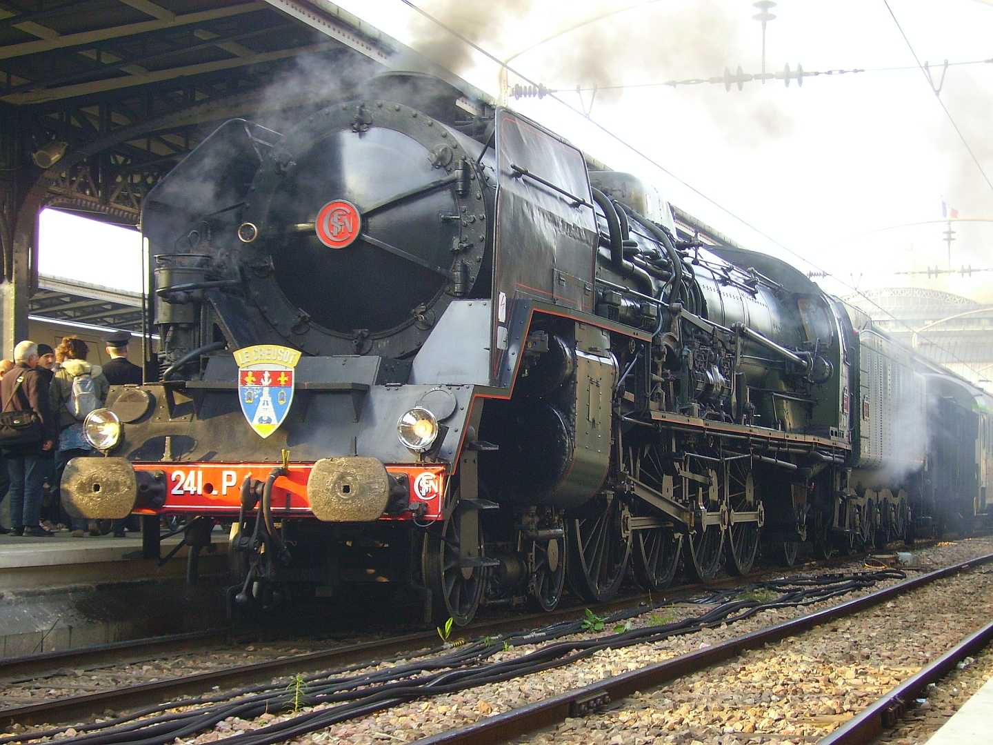 La 241 P 17 à Paris gare de l'Est le 8 mai 2010.